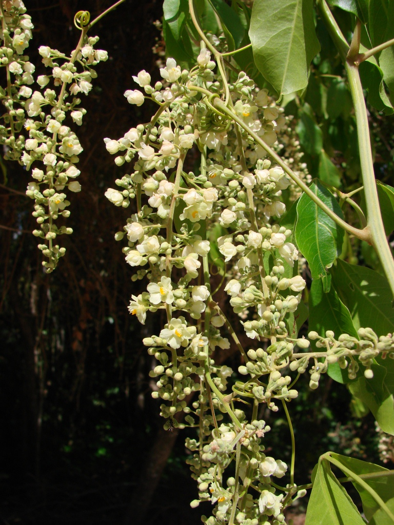 Serjania reticulata Cambess. - SAPINDACEAE - Parque Nacional de Brasília - Brasília - Distrito Federal - Brasil.